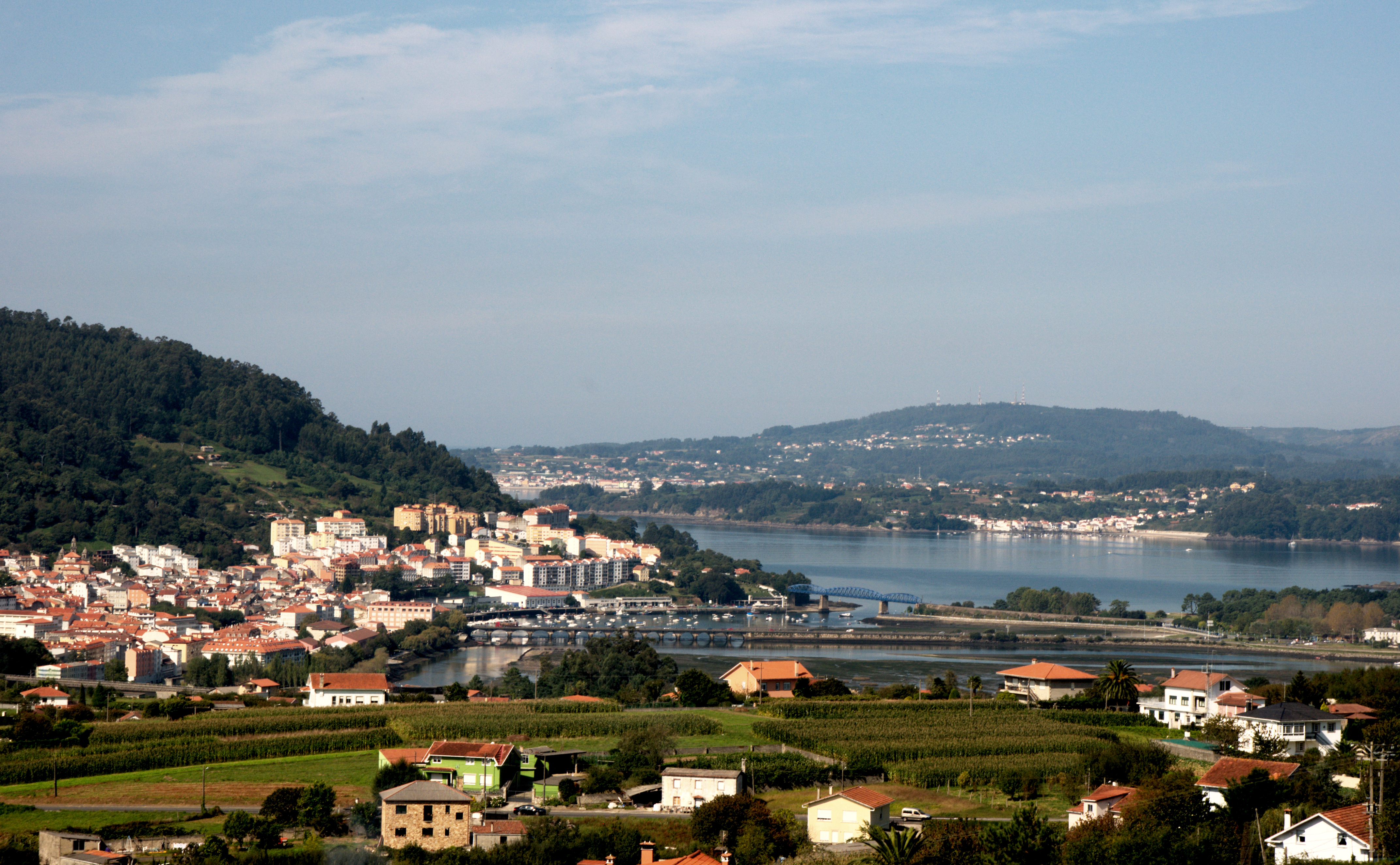 Pontedeume und die Ría Ares